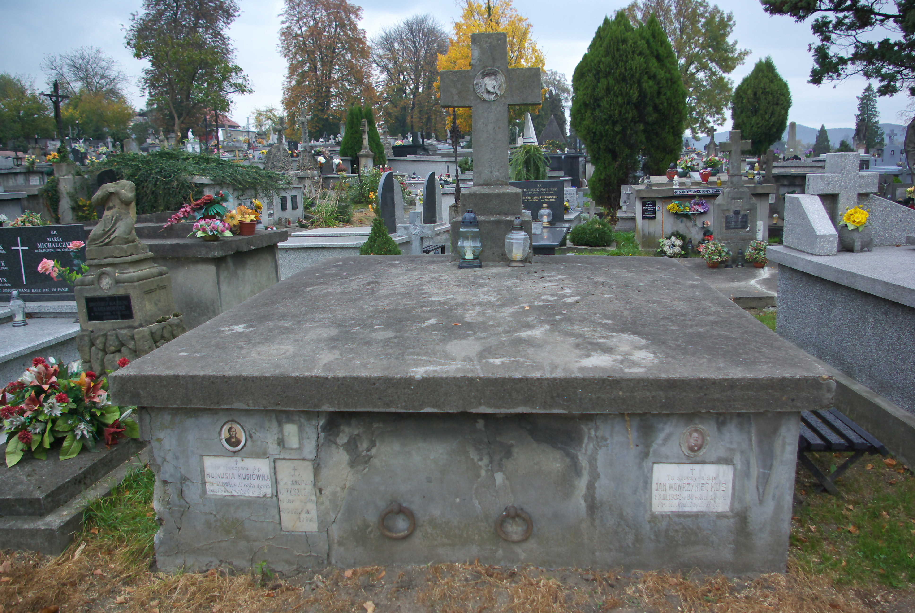 Grobowiec rodziny Kuś na Cmentarzu Centralnym w Sanoku. Pochowani Honusia Kuś (zm. 1924), Jan Wawrzyniec Kuś (zm. 1932), ks. Franciszek Witeszczak (1890-1945).